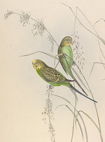 Ausschnitt aus der Tafel zu Wellensittichen